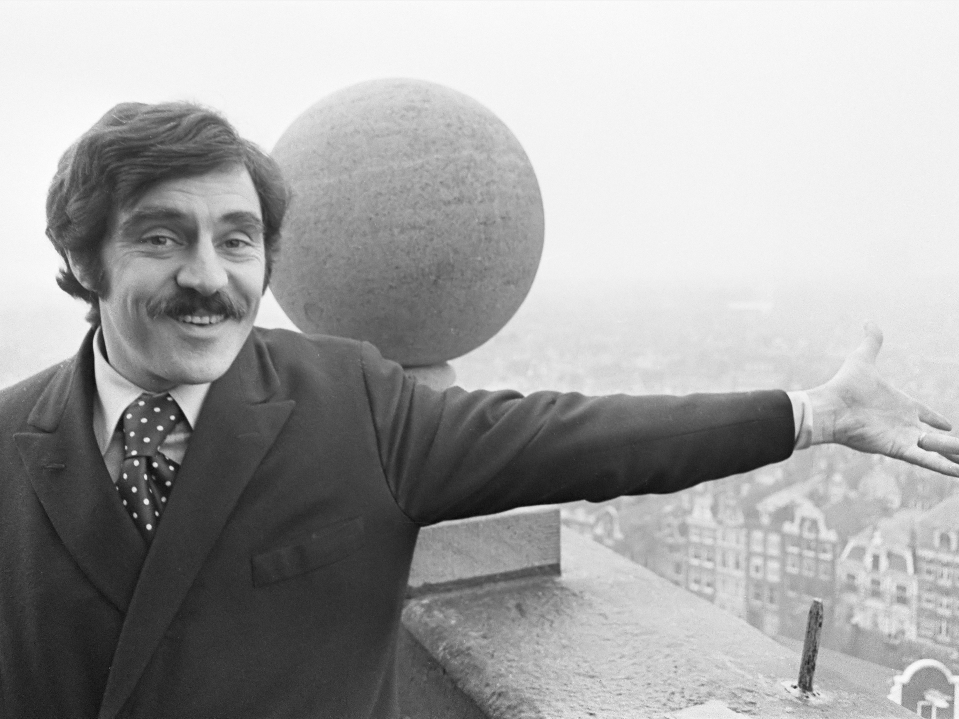 Anthony Newley in Amsterdam, hoofrol in Doctor Doolittle 14 december 1967